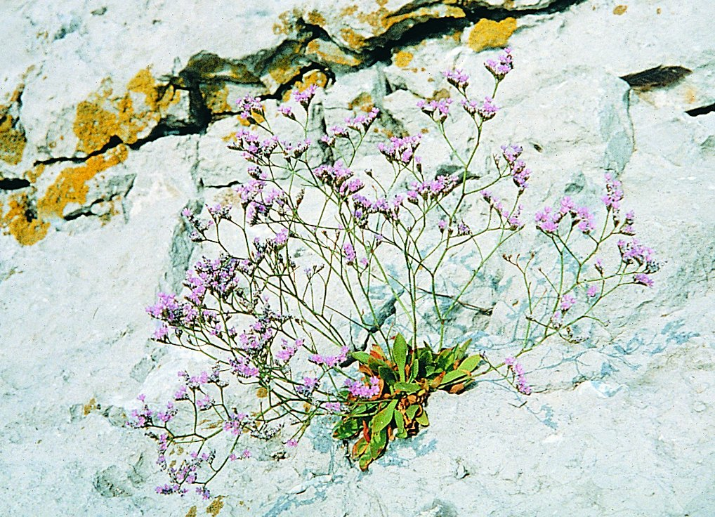 Rock Sea Lavender on Flat Holm island